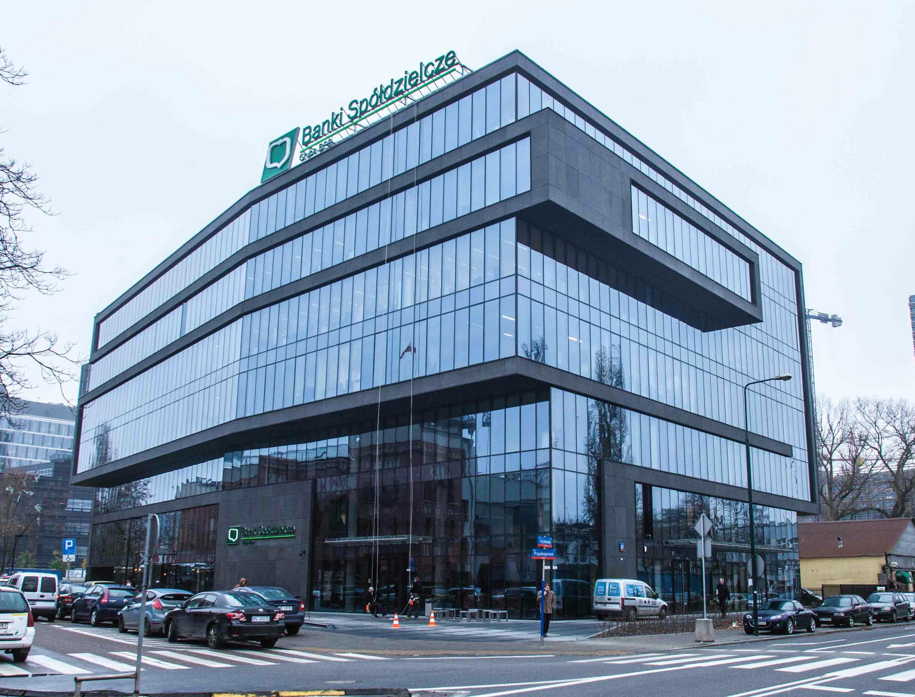 Siedziba Banku Polskiej Spółdzielczości S.A.